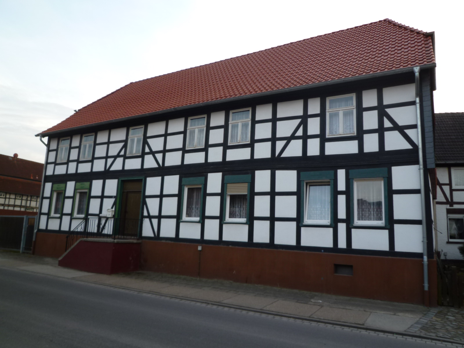 Denkmalgeschütztes Wohnhaus in Calvörde, Polschebockstraße 1, Vorderansicht 2011